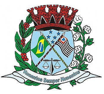 No listel, em campo de prata, e palavras de blau, inscreve-se a divisa “HONESTOS SEMPER HONESTO” – Fidelidade (respeito sempre) à Honestidade.